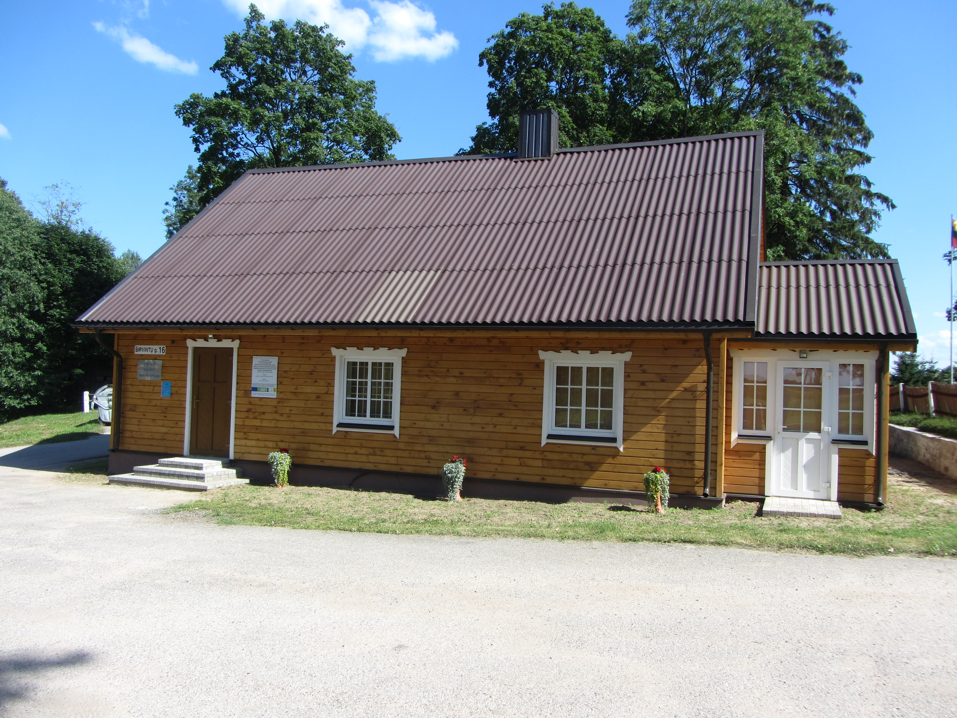 Zibalai, Lithuania